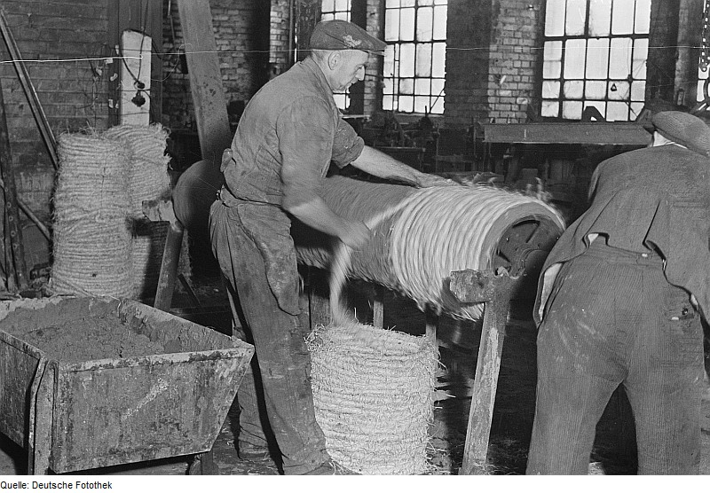 Original image description from the Deutsche FotothekZwei Arbeiter an einer Seilwinde